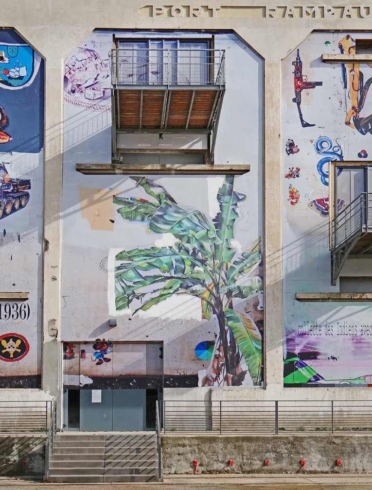 Détail de l’œuvre murale de l'artiste brésilien Paulo Nimer Pjota sur la façade coté Saône de la Sucrière Cette installation composée de collages s'inscrit dans la tradition du Street Art et des Favelas, elle couvre la totalité du mur extérieur. Certaines peintures de l'artiste exposées au musée d'art moderne ont été reconfigurées pour interagir sur les murs et créer une narration à plusieurs entrées, répondant ainsi au thème de la Biennale 2013. ___________ La Sucrière est un centre d'accueil de grands évènements dont la Biennale d'art contemporain Espace d'exposition et de manifestation (9.000 m2) Architecte : Z Architecture la Sucrière est un ancien entrepôt des années 1930, qui a été réhabilité en 2011, elle accueille depuis 2003 la biennale d'art contemporain et des expositions temporaires. Façade de la Sucrière en 2007 Façade de la Sucrière en 2005